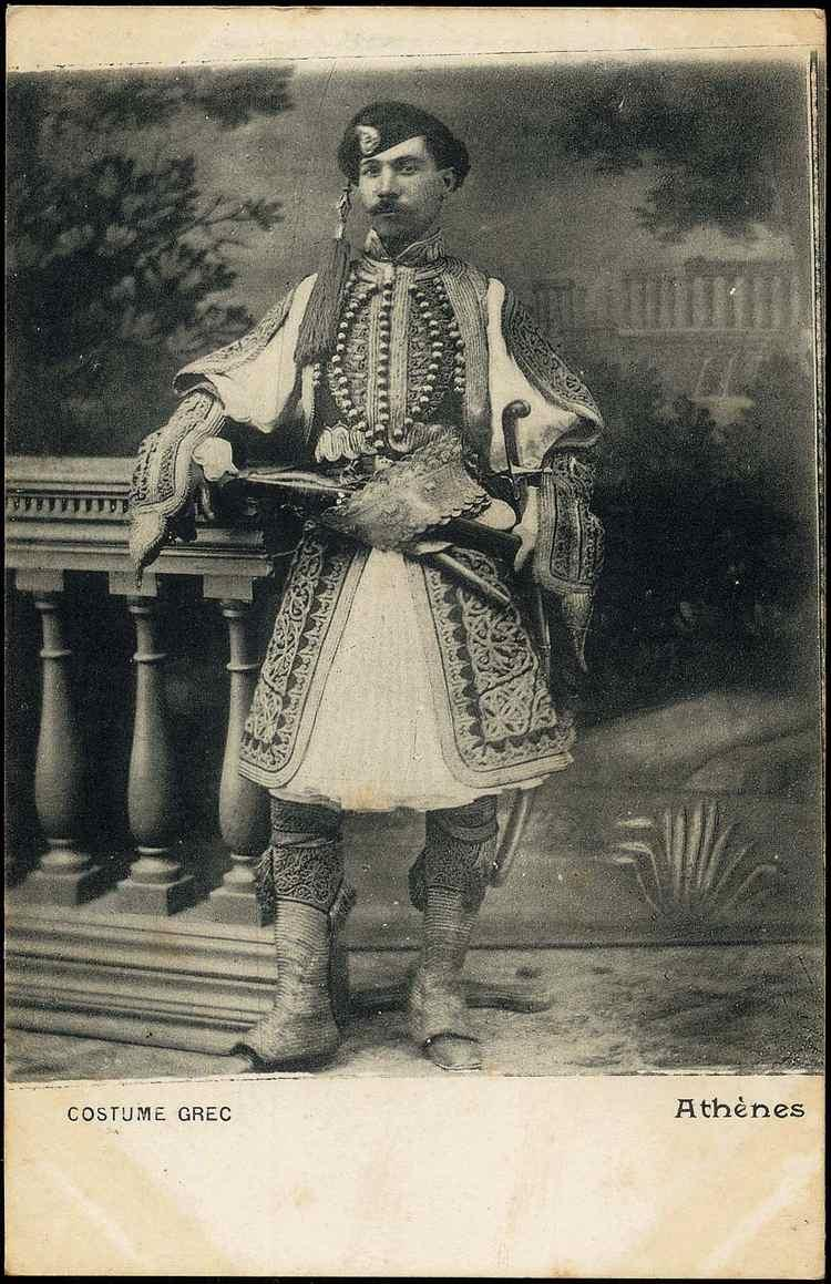 Athenes. Costume Grec.